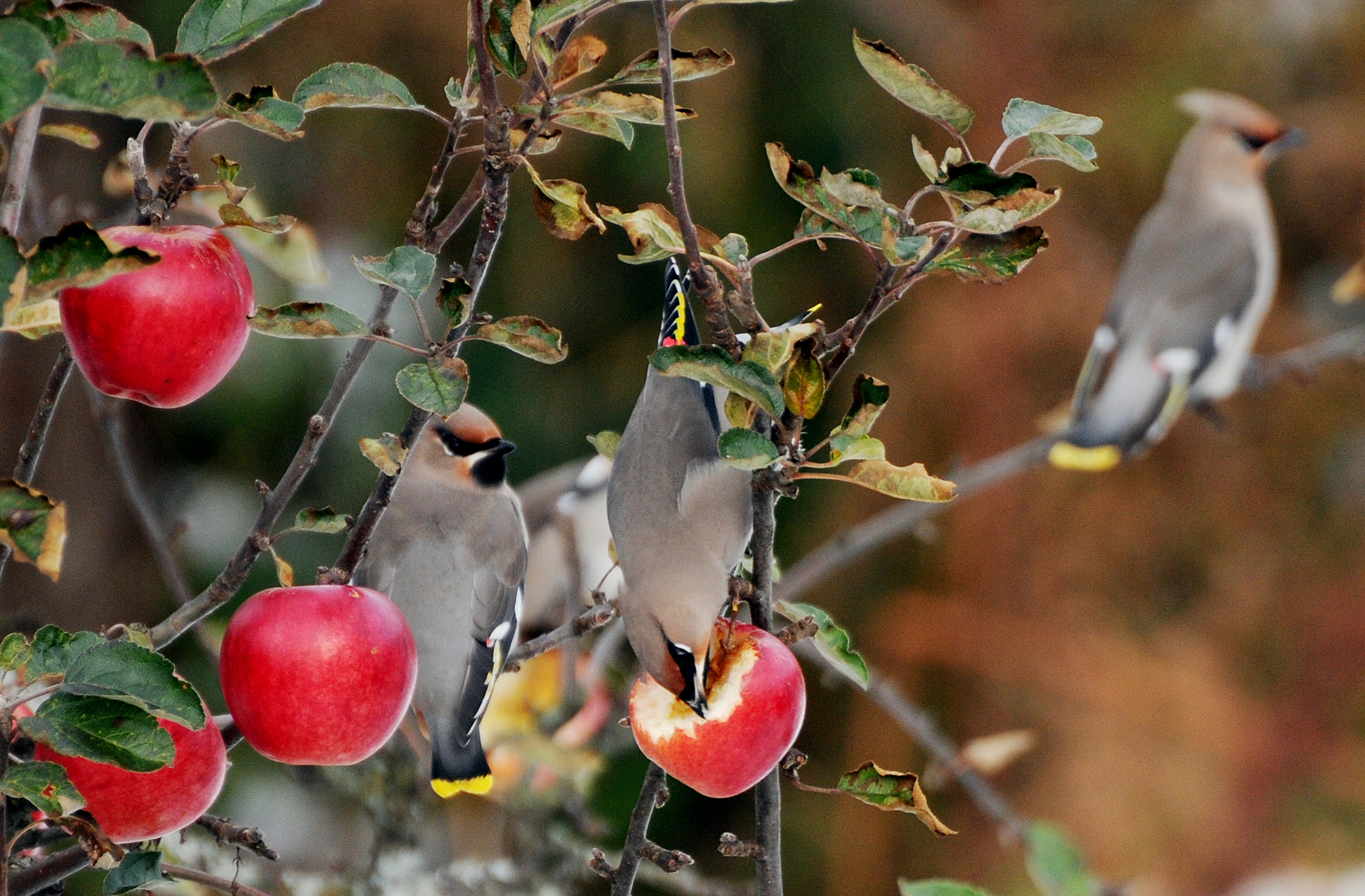 Sidensvanser som spiser epler i en hage i Risør 24. oktober 2010.